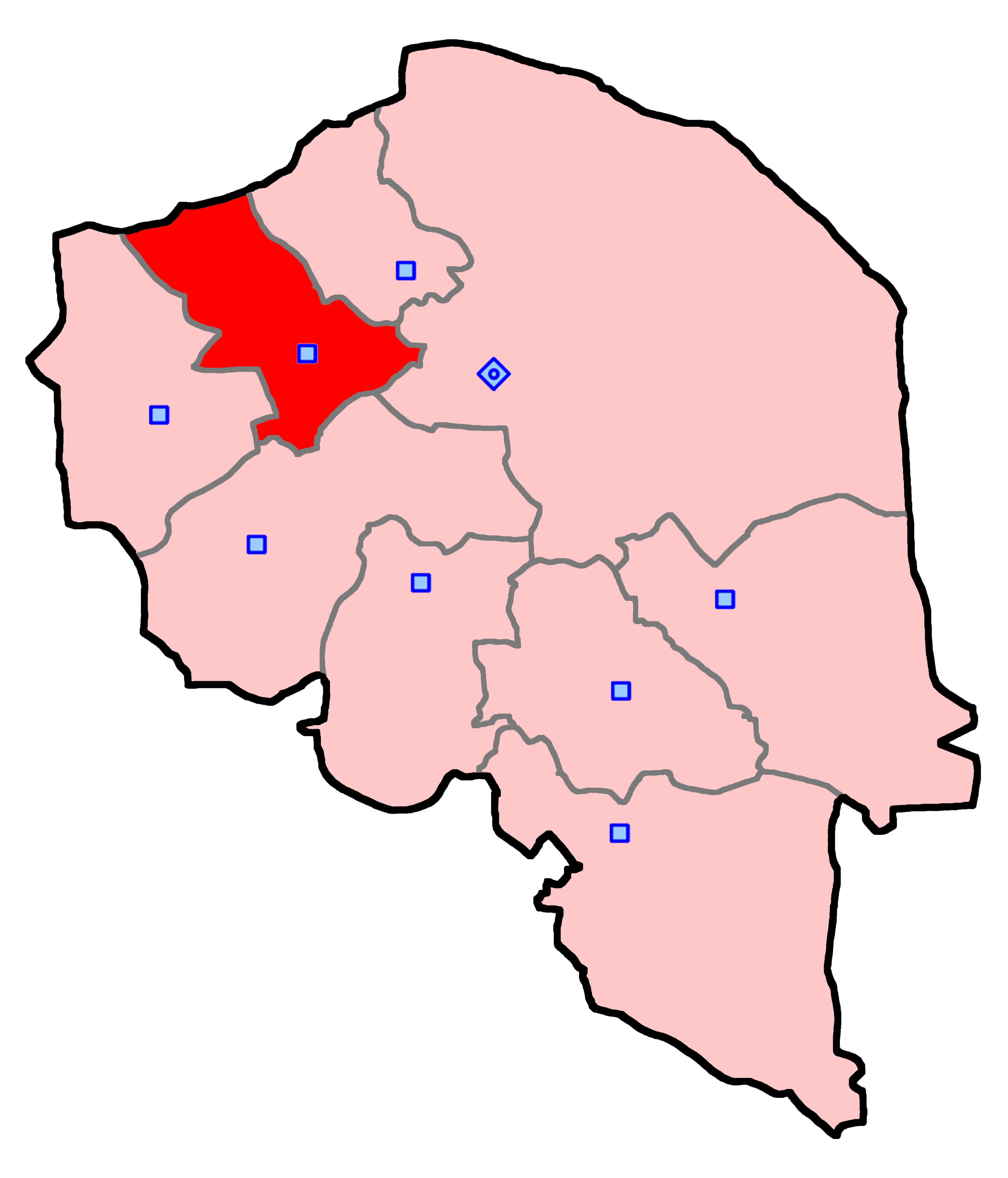 رفسنجان و انار برای انتخابات مجلس شورای اسلامی